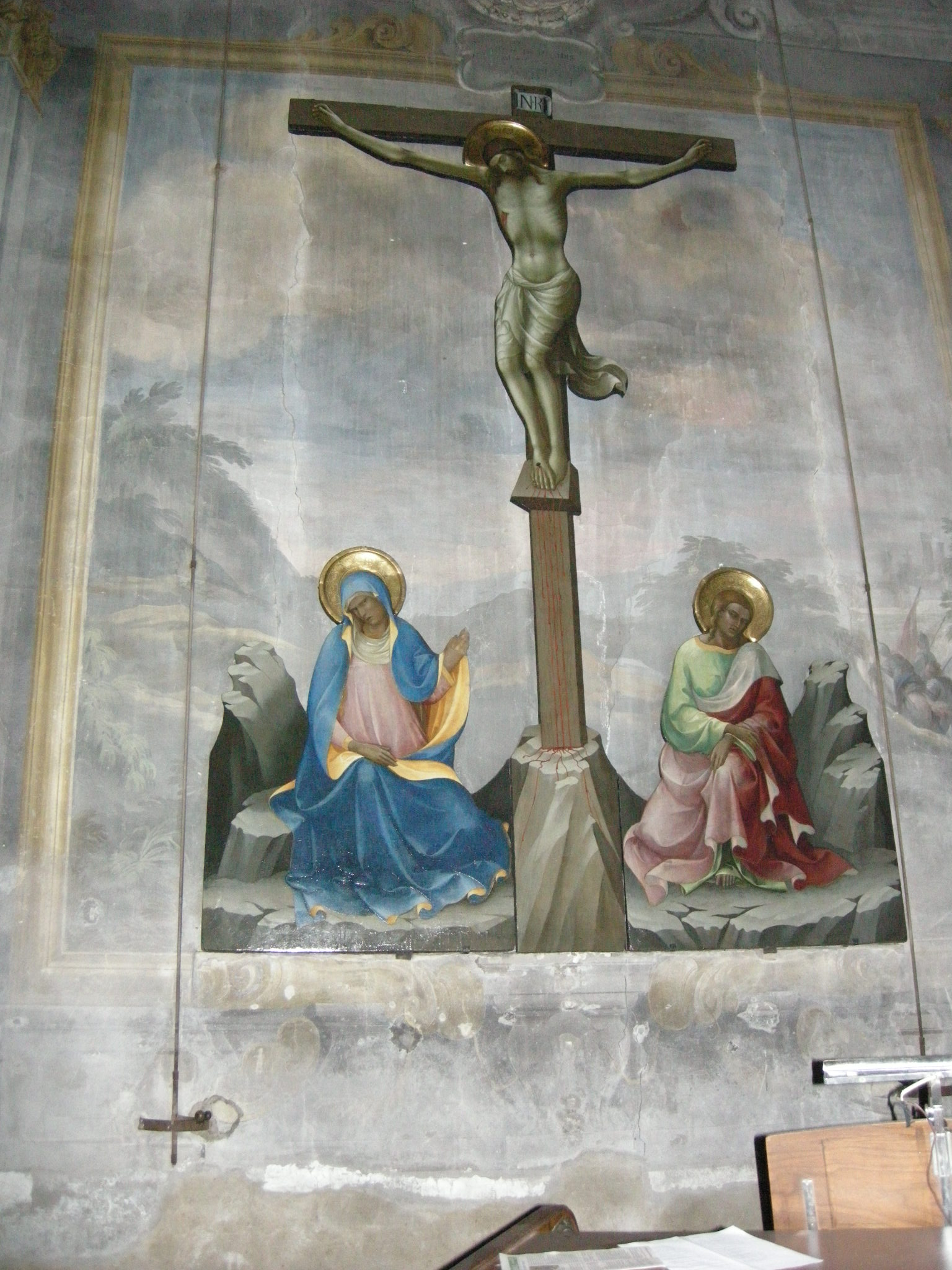 San Giovannino dei cavalieri, cappella maggiore, crocefissione dipinta